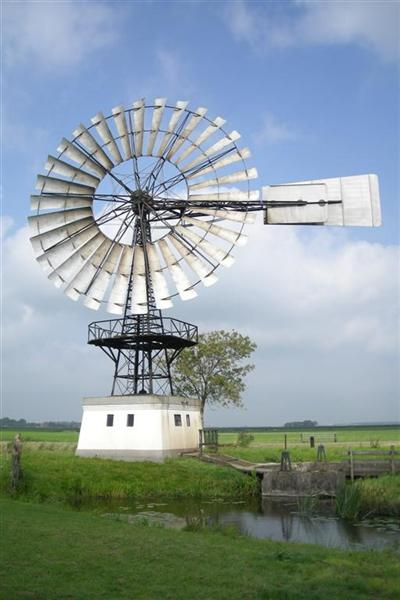 Windmotor bij Weidum